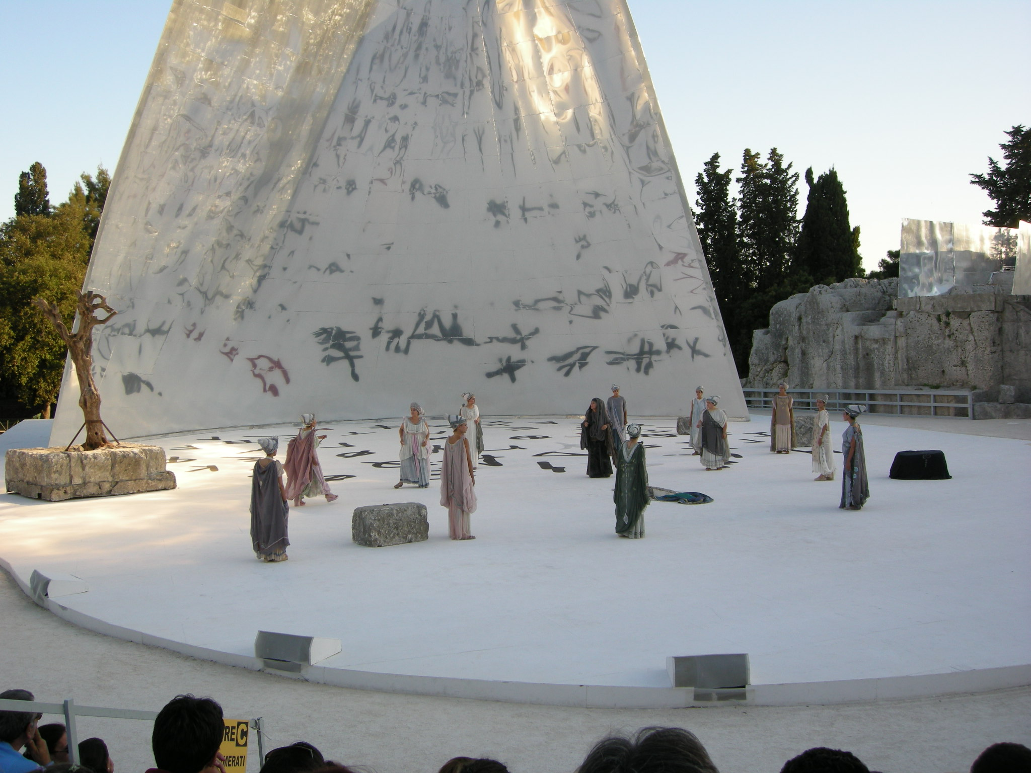 Medea rappresentation (2009)